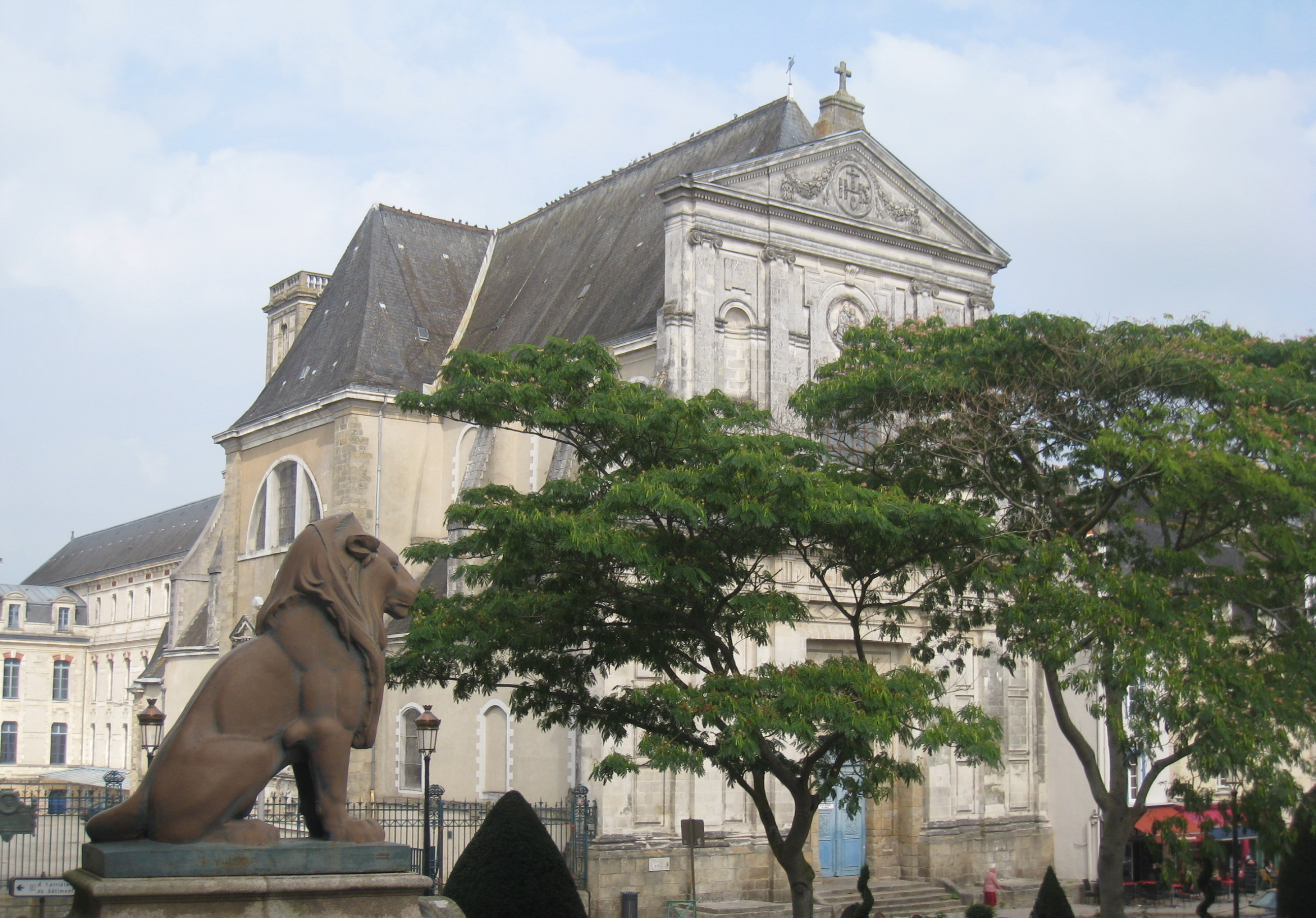 Chapelle Saint Yves de Vannes